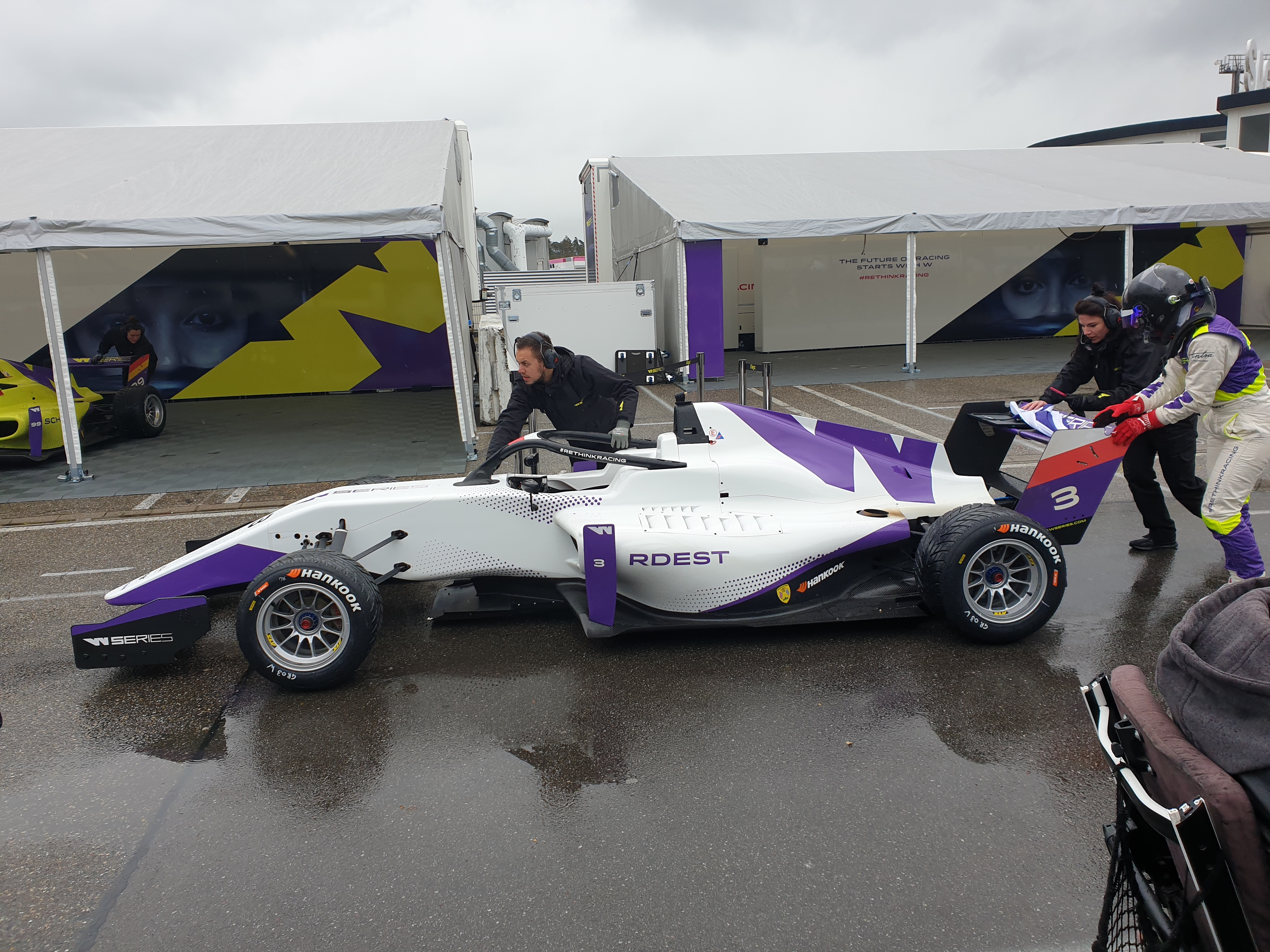 Tatuus T318 W Series mit Lackierung